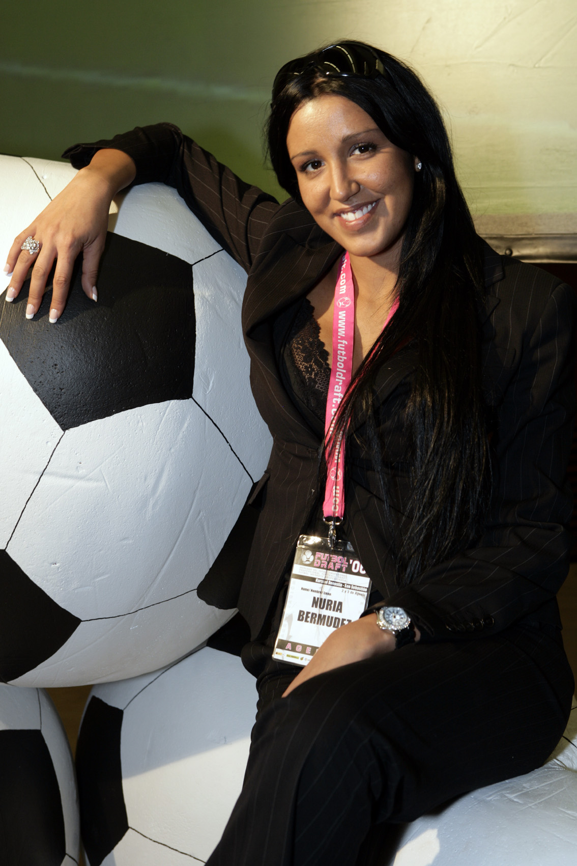 La Nuri, Nuria Bermúdez